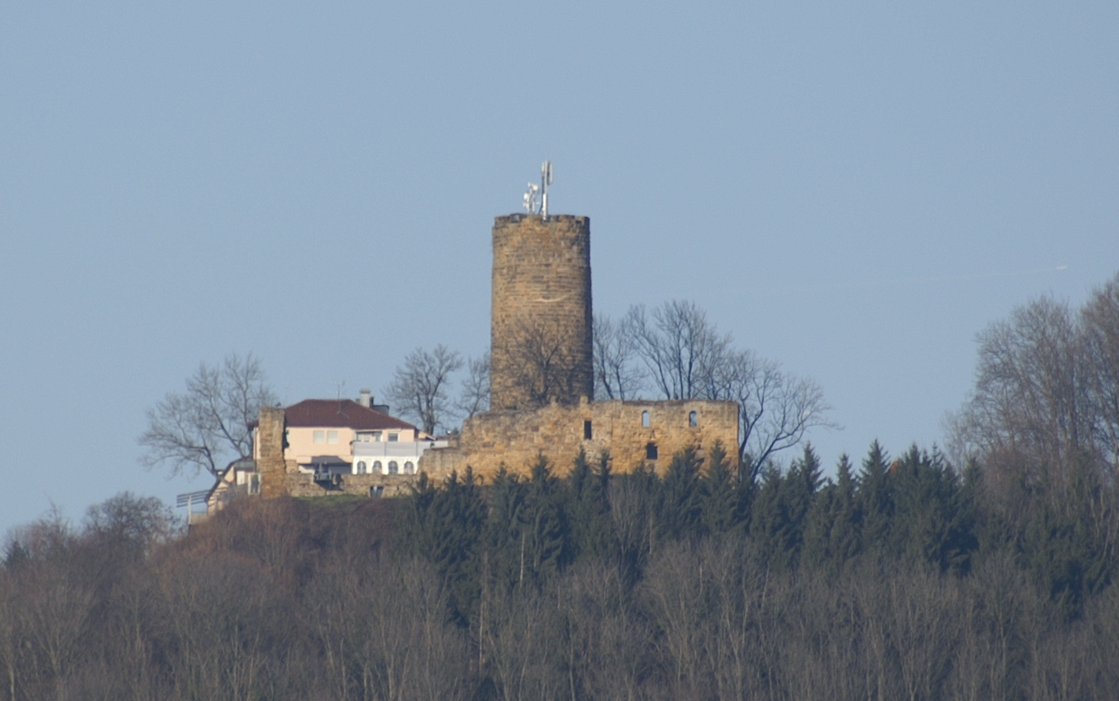 Burg Staufeneck im mittleren Filstal bei Süßen